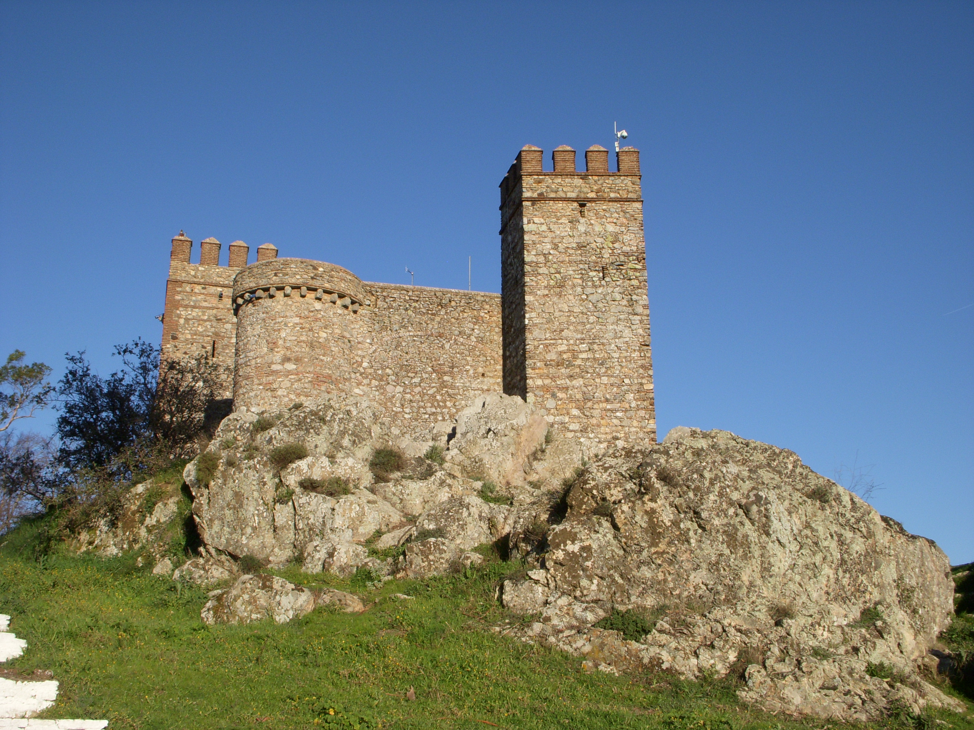 Castillo de Cortegana, provincia de Huelva, España, construido en tiempos de Sancho IV de Castilla (s. XIII). Según el investigador Emilio Carrillo este castillo pudo ser de origen templario.